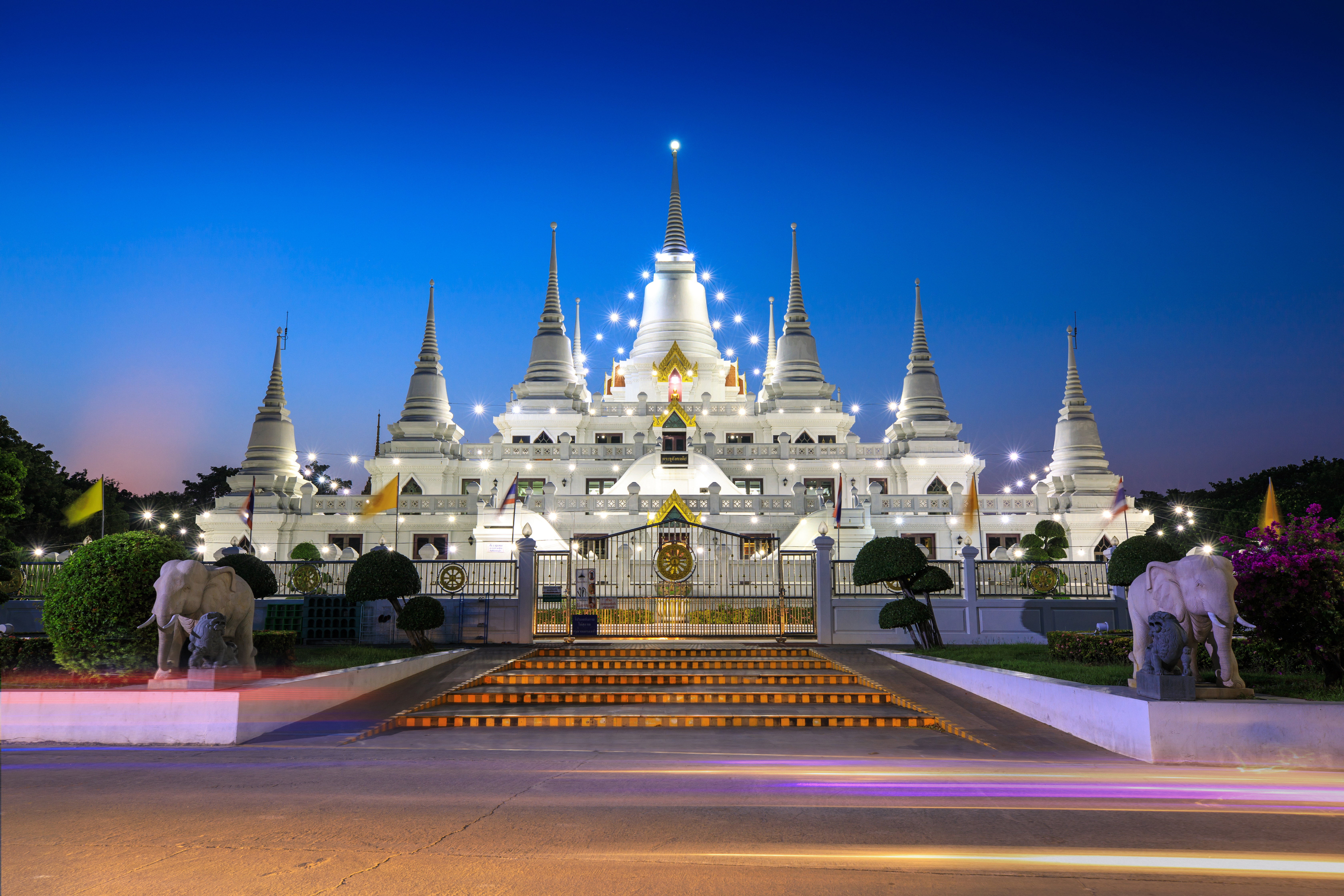 พระธุตังคเจดีย์ วัดอโศการาม จ.สมุทรปราการ